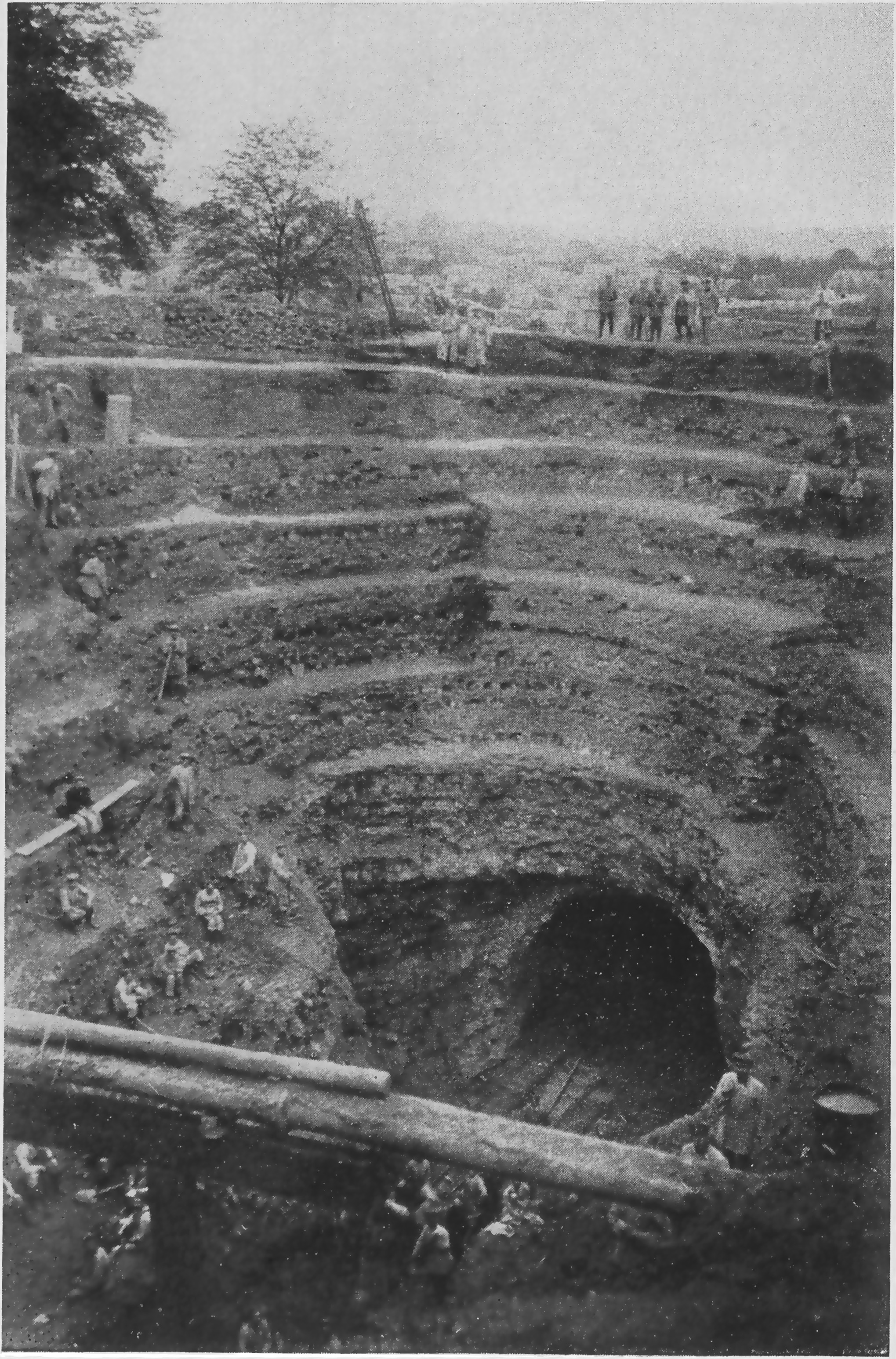 Wiederherstellungsarbeiten am Tunnel zwischen Mohan und Charlesville, Oktober 1915